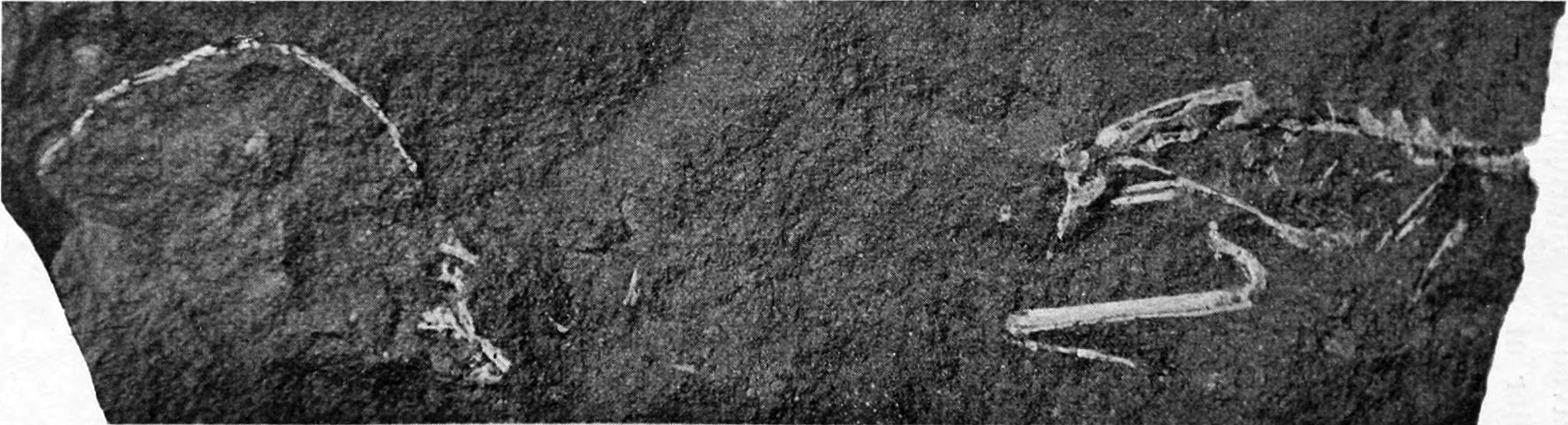 Podokesaurus holotype.